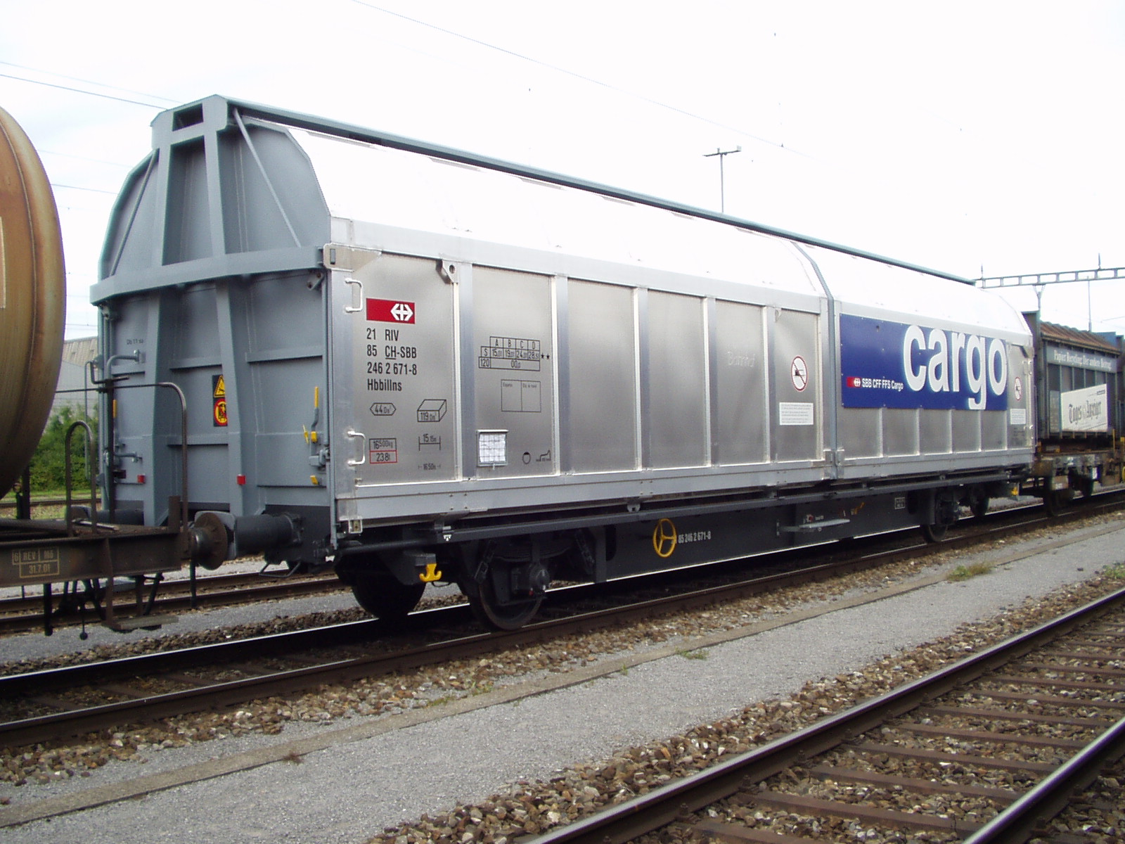 Geschlossener Güterwagen Hbbillns der SBB. Aufgenommen am 09.09.2005 im RB Limmattal durch S.Hinni (eignes Bild).